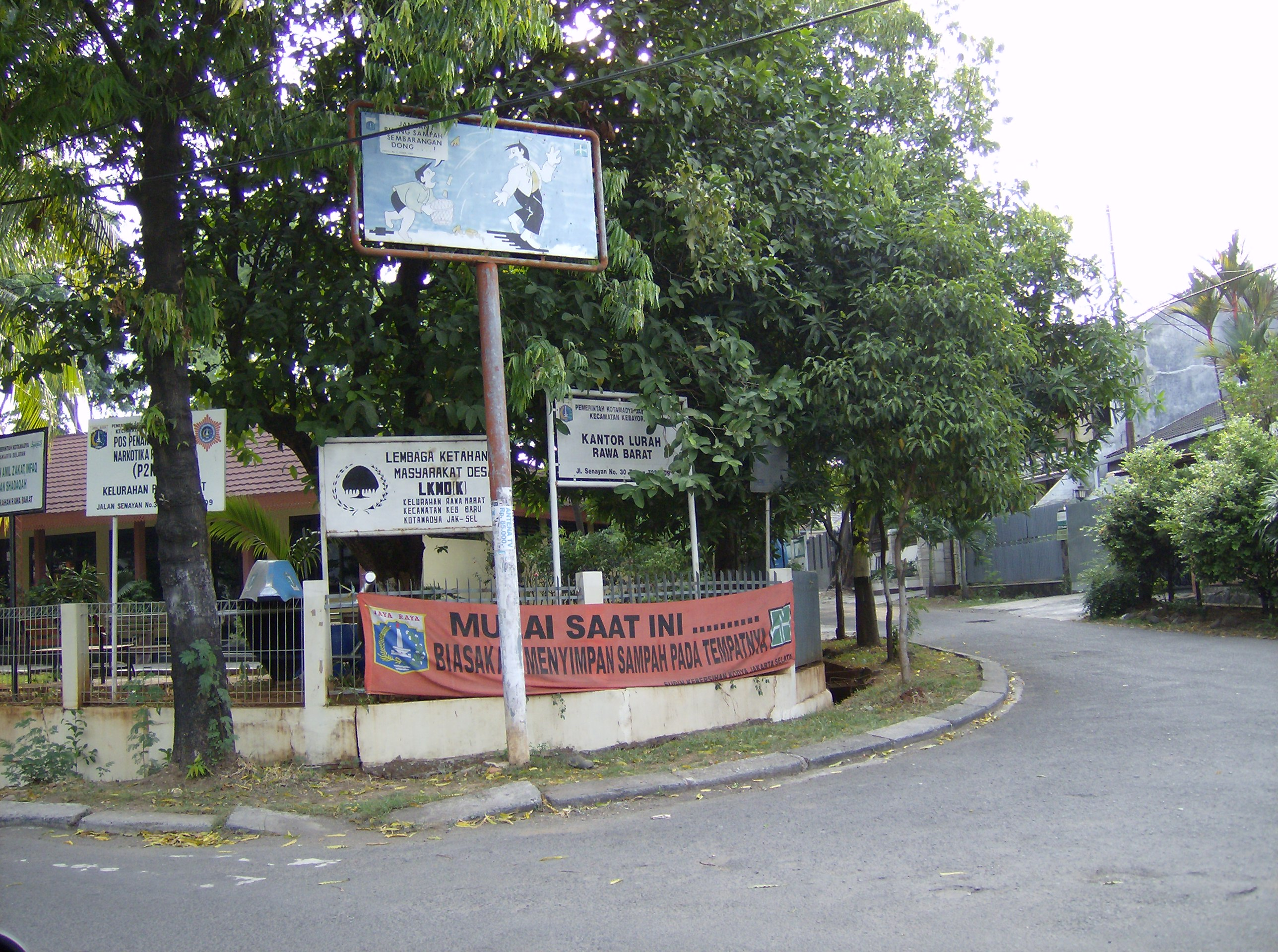 Unknown language: Kelurahan Rawa Barat-Kebayoran Baru